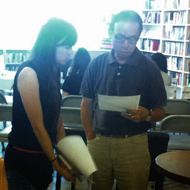 「菊次郎與佐紀」新書發表與座談會@永樂座台大店。